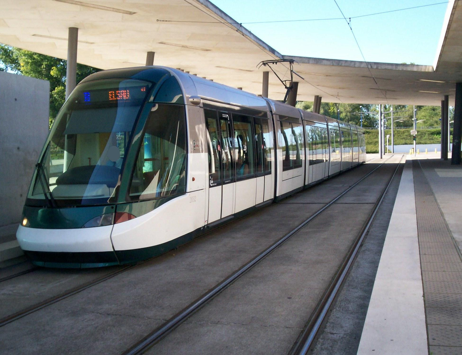 Tramways de Strasbourg Ligne B à Hoenheim Gare, le 26 Août 2007, jour de l'inauguration de l'extension du réseau Tramway Strasbourgeois